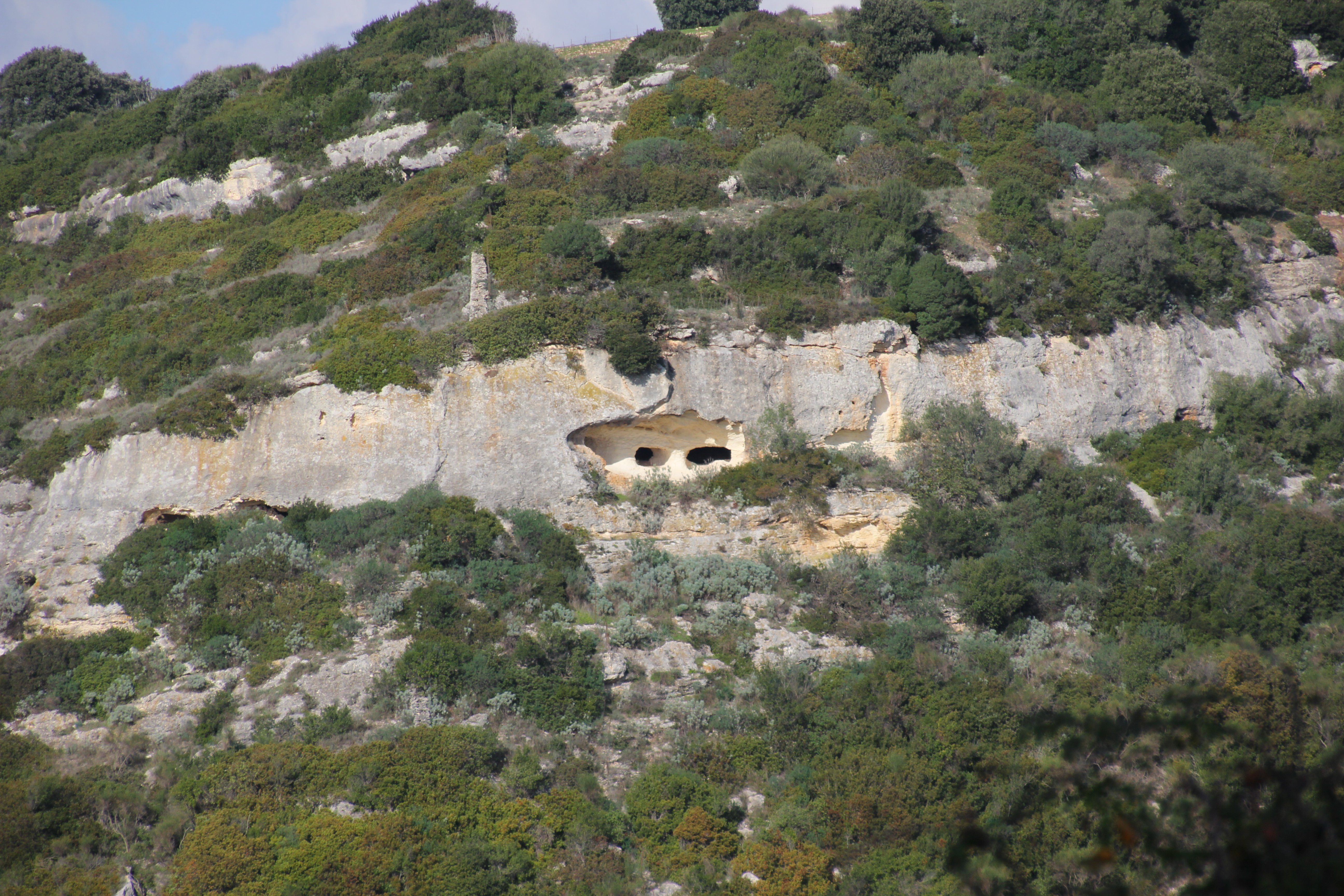 Sassari - Necropoli di Badde Inza